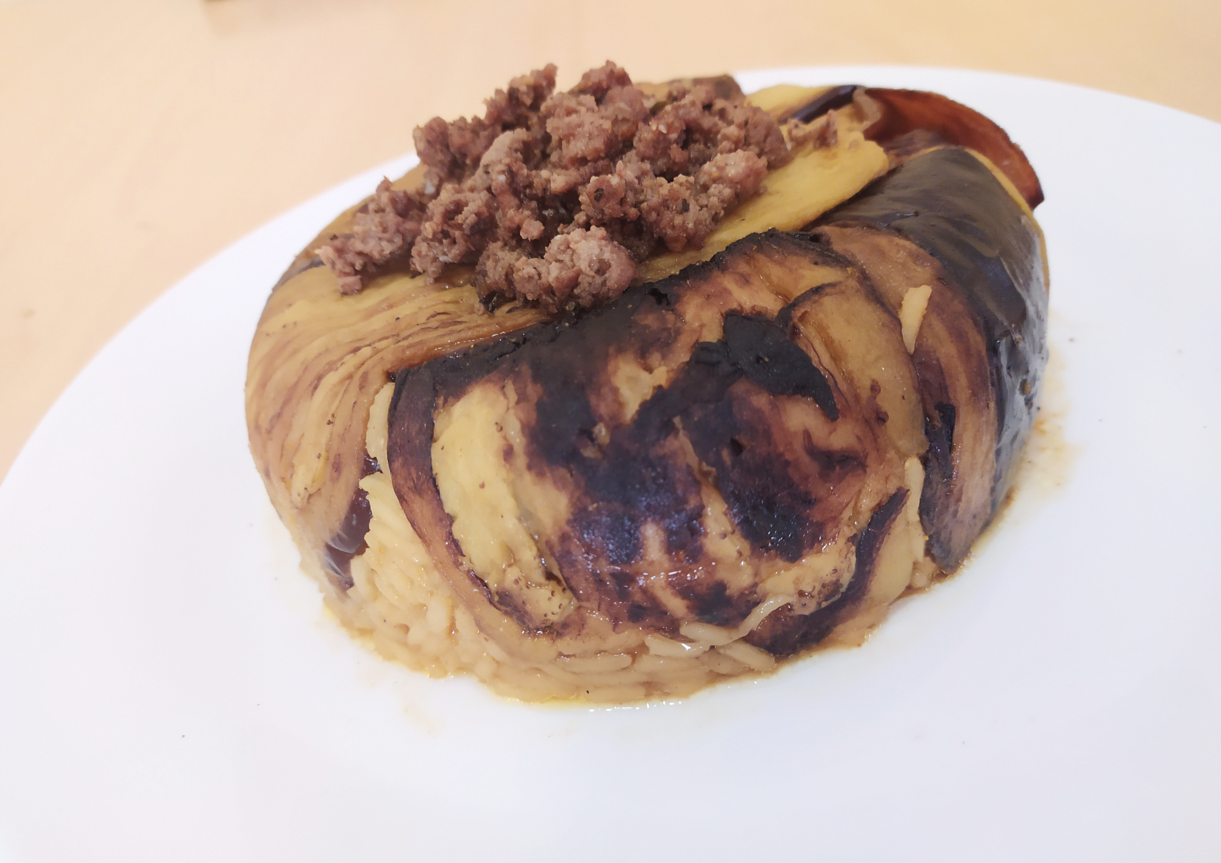 مقلوبة باذنجان باللحم- طبق رئيسي في بلاد الشام